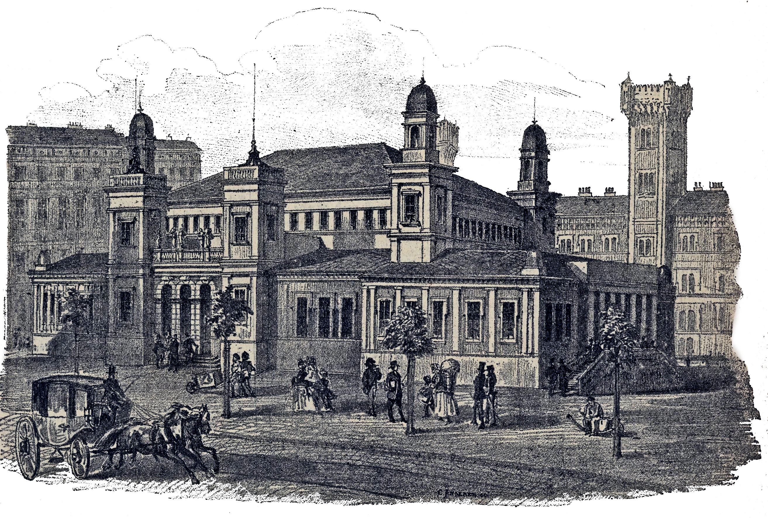 Wien-Innere Stadt, Schottenring 19, Provisorische Börse, erbaut 1871/72